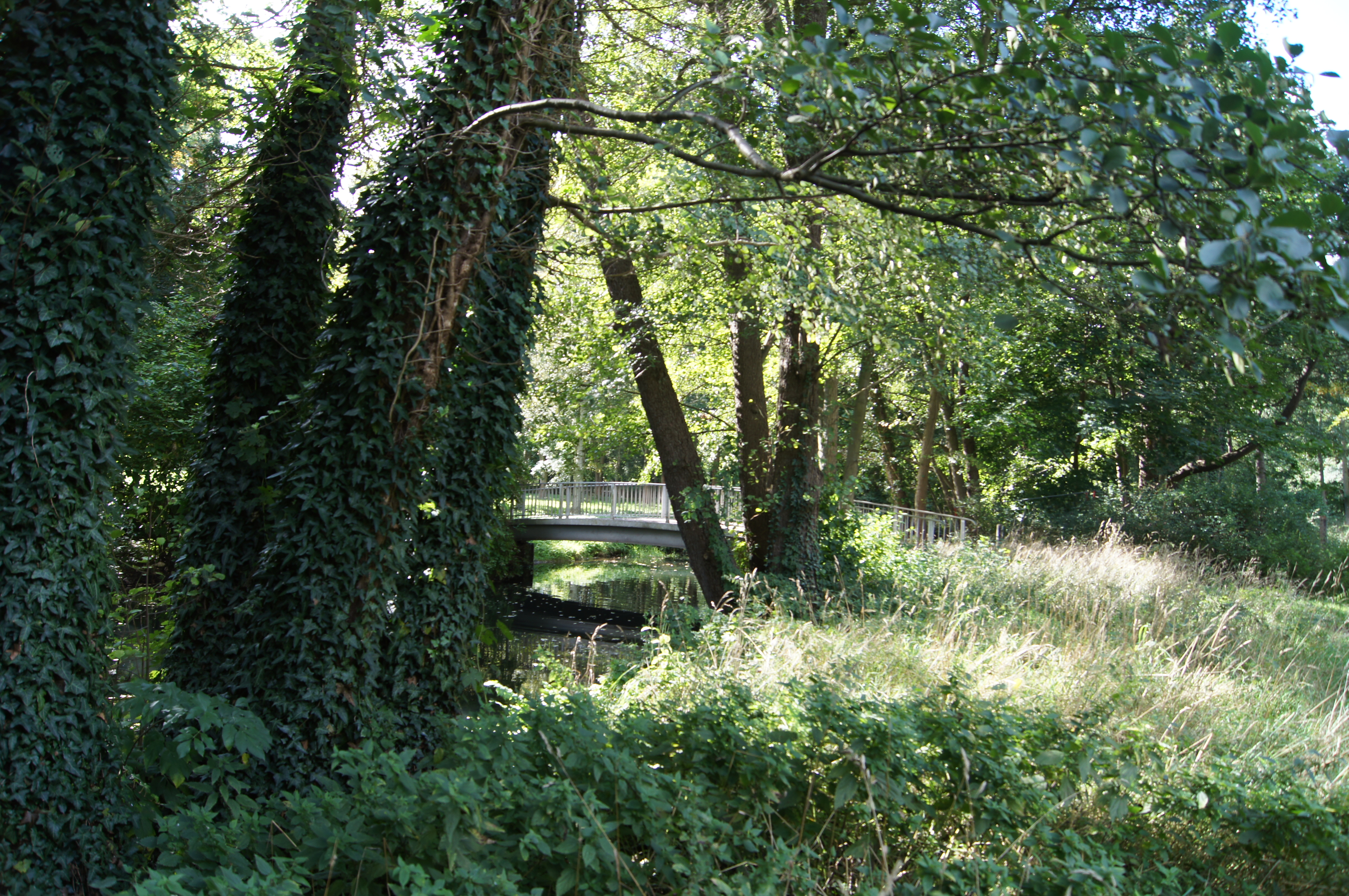 Schlosspark Berlin-BuchThis is a photograph of an architectural monument.